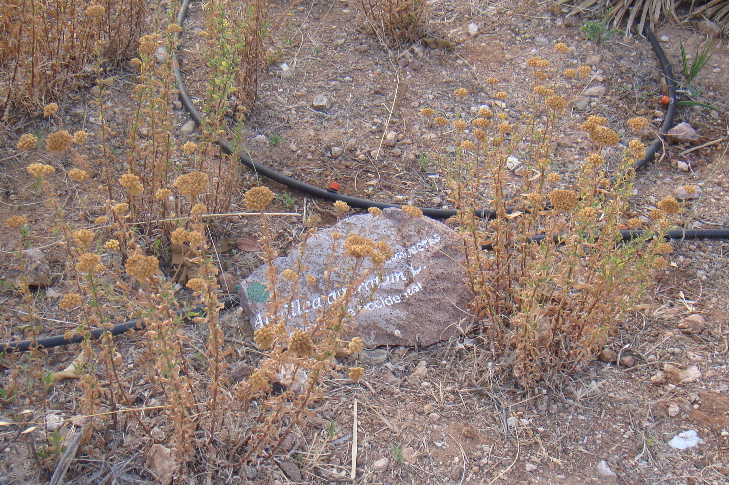 planta en el Jardín Botánico del Albardinal de Rodalquilar, en Nijar, provincia de Almería (España). Se encuentra dentro del Parque natural del Cabo de Gata-Níjar.